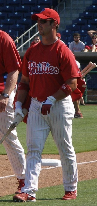 Aaron Rowand